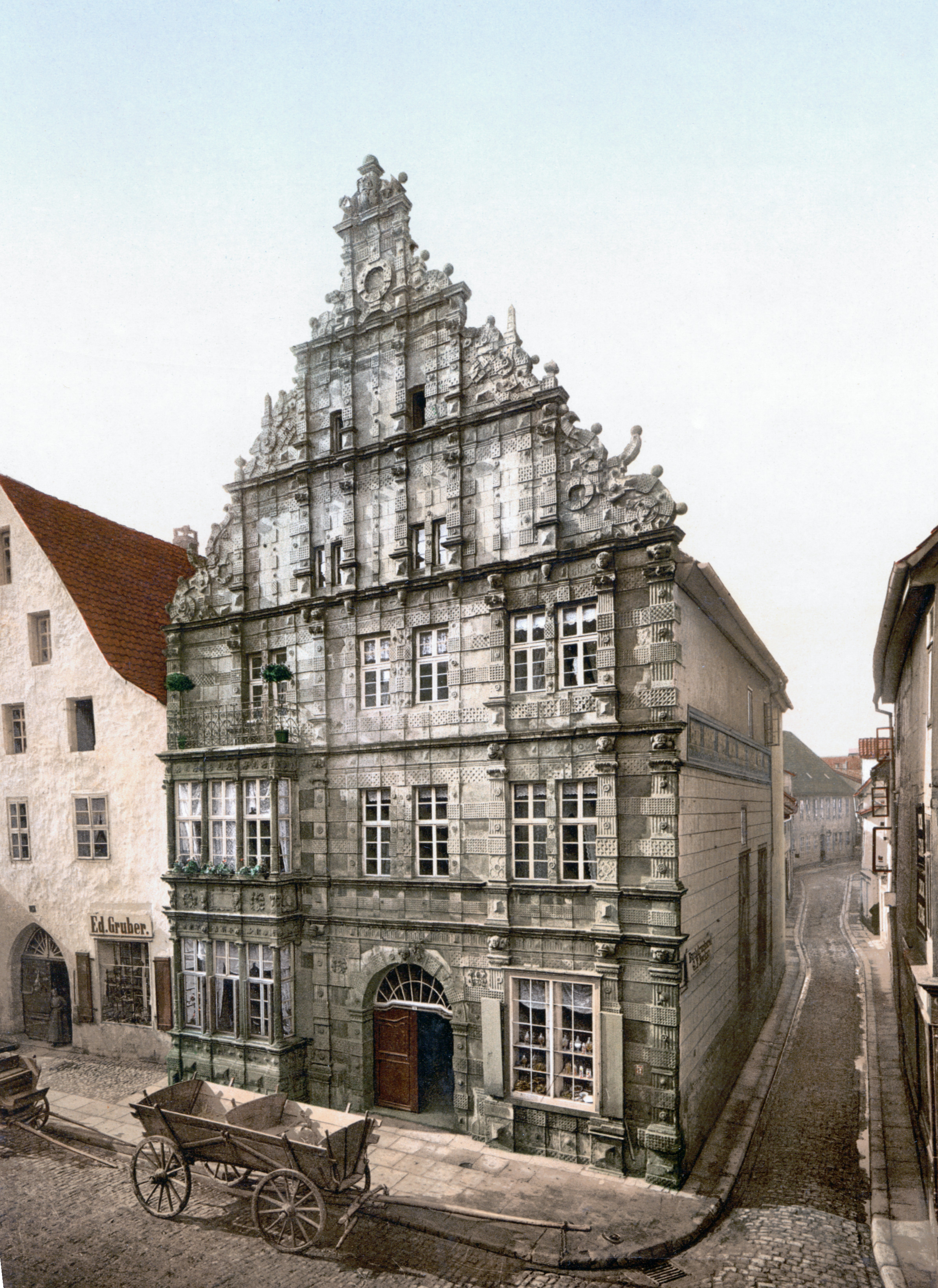 Hameln, Rattenfängerhaus